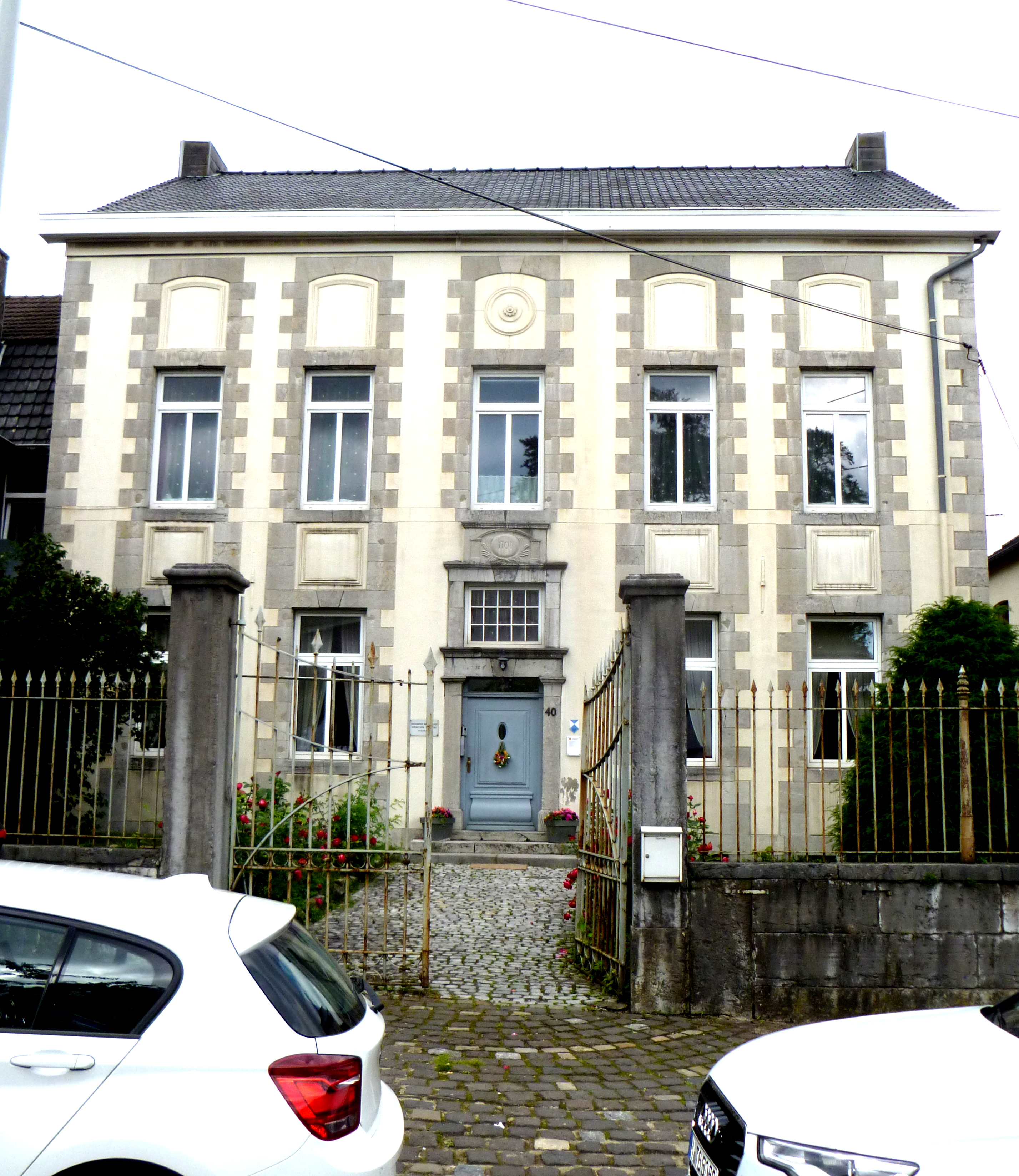 Baudenkmal in Eupen, Pfarrhaus und erstes Bethaus der evangelischen Christen Eupens